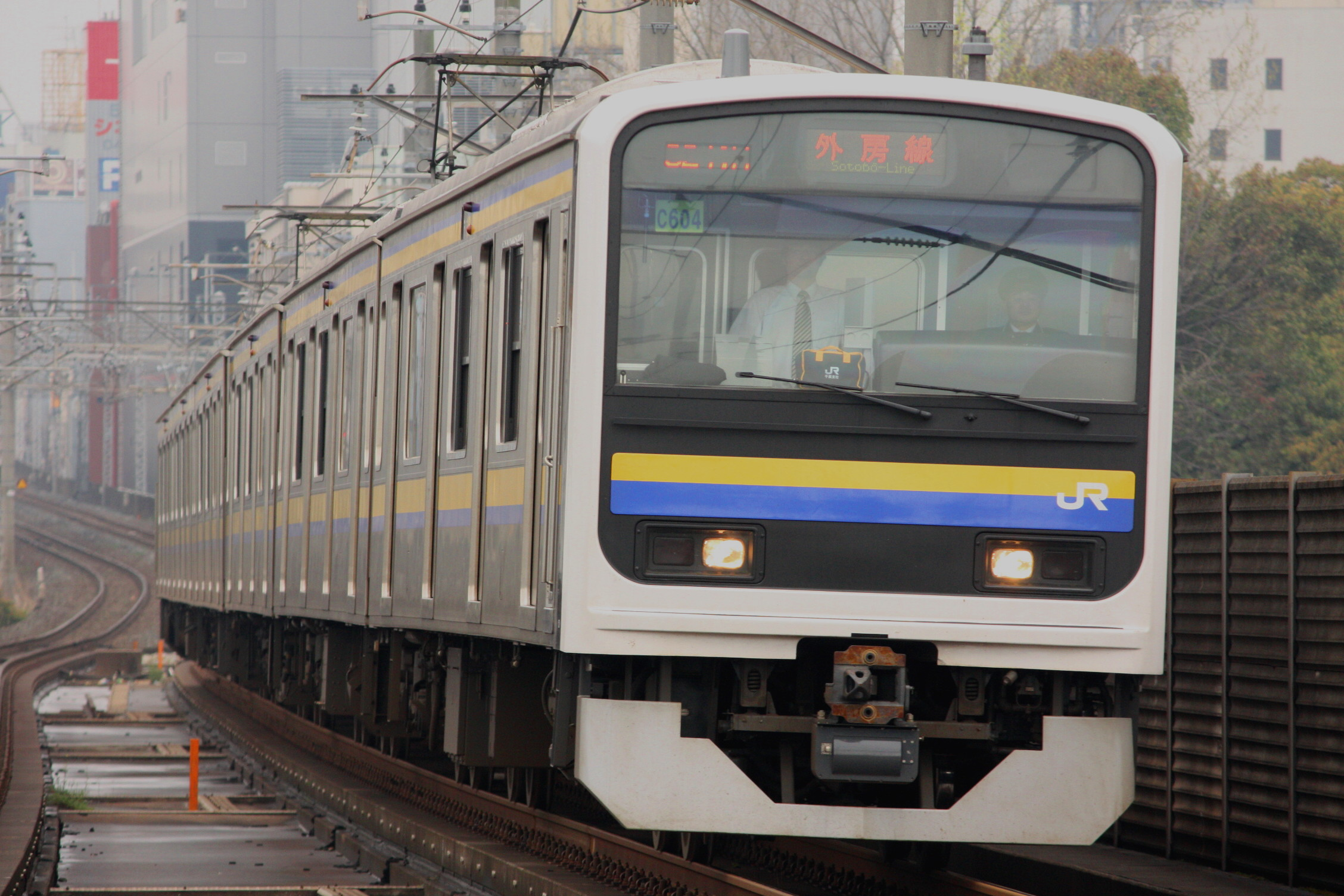 本千葉駅に進入する209系2100番台。